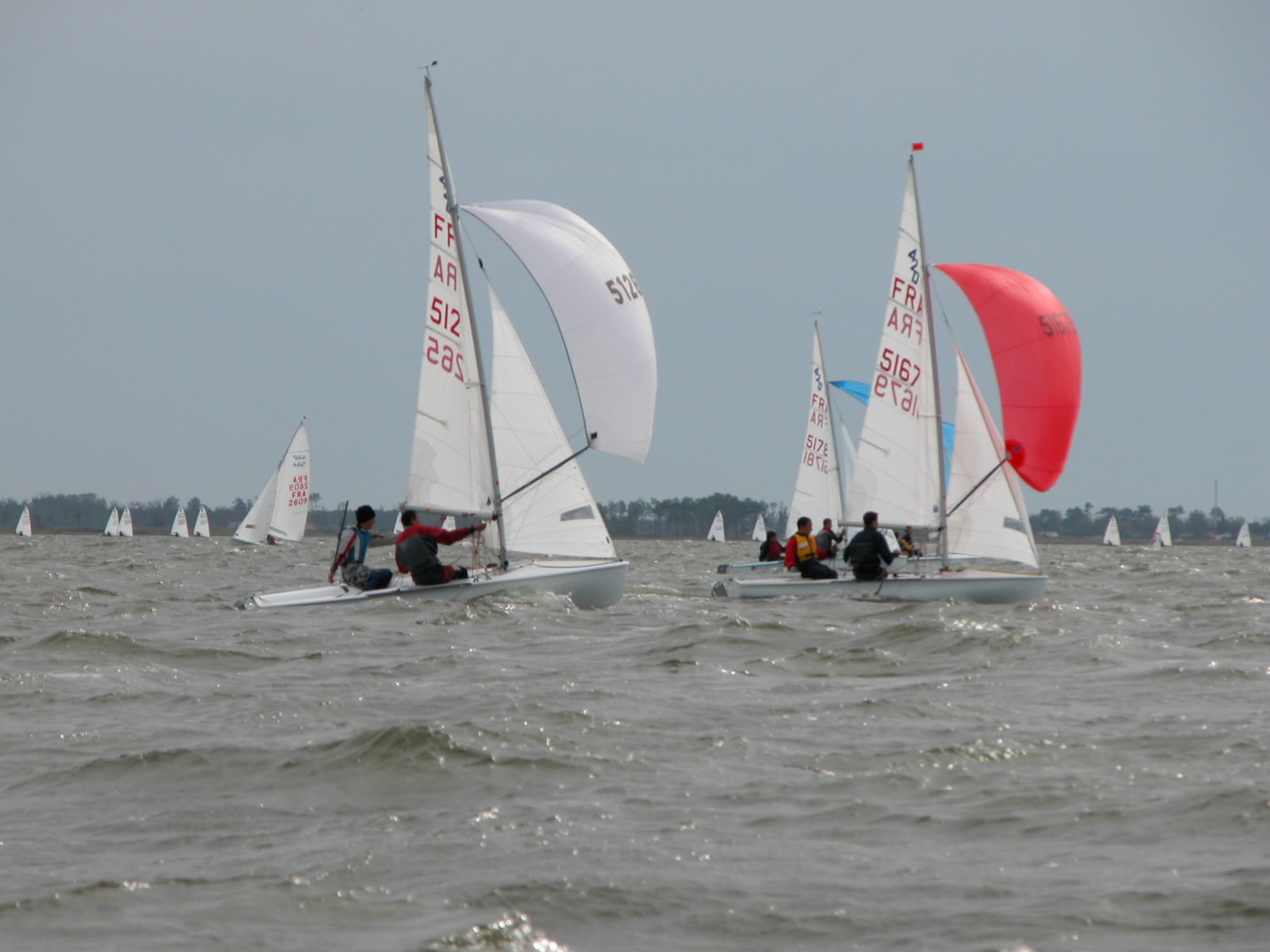 regate de 420 sur le lac de Maubuisson